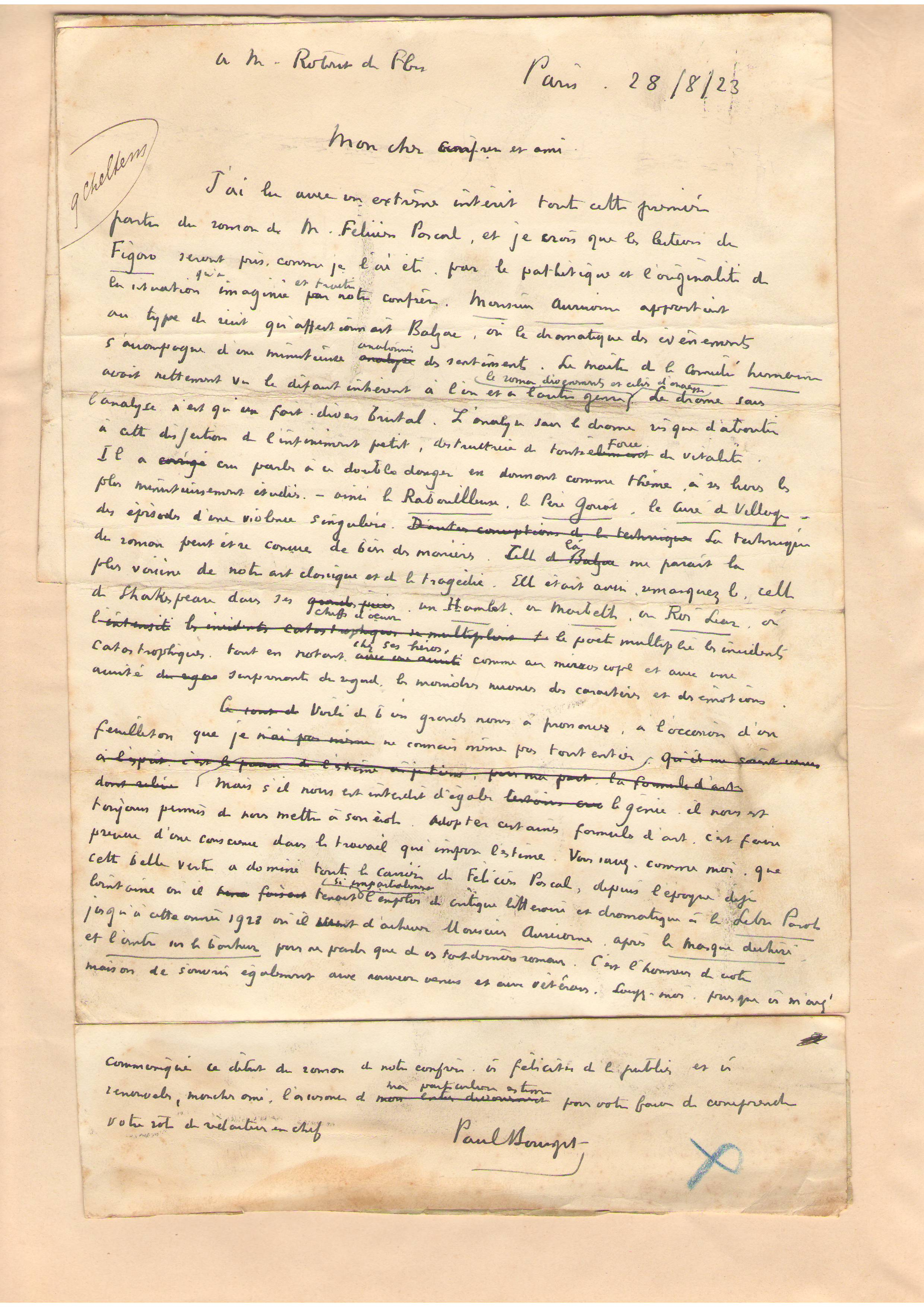 Le Plantier, fonds d'archives de Paul Bourget